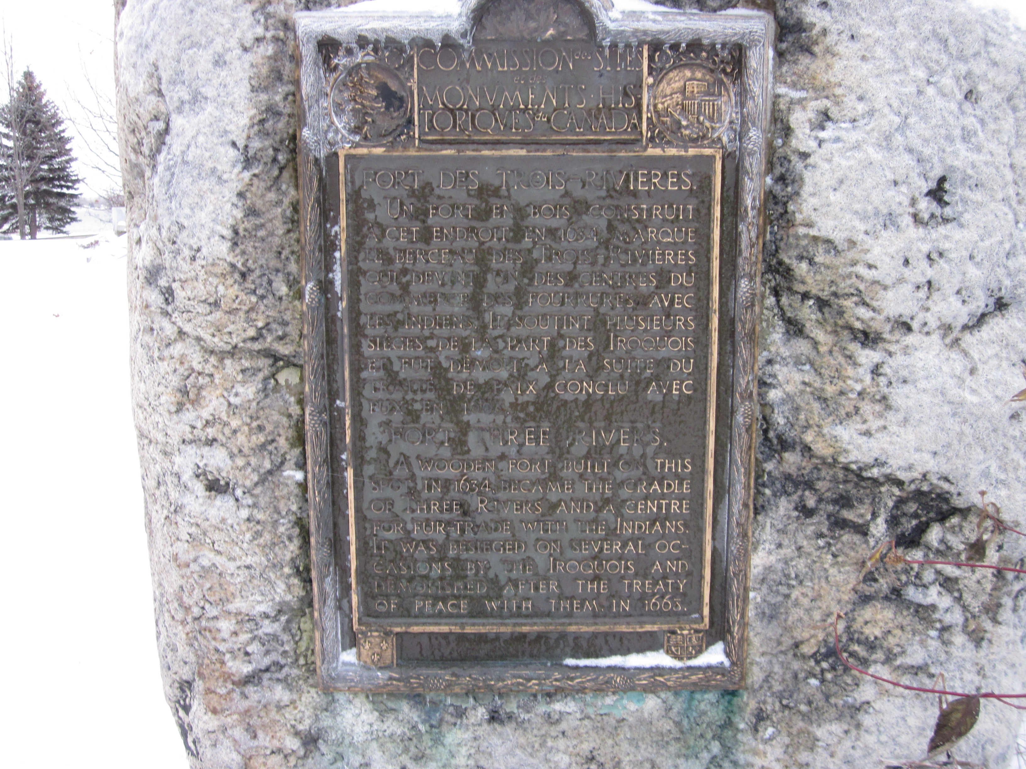 Plaque du Fort Trois-Rivières